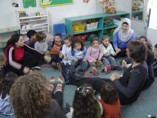 Paola Anselmi e Francesca Scaglione ad un kindergarten di Beit Hanina (gerusalemme Est) nell'ambito dei progetti di Note di PAce Gennaio 2005